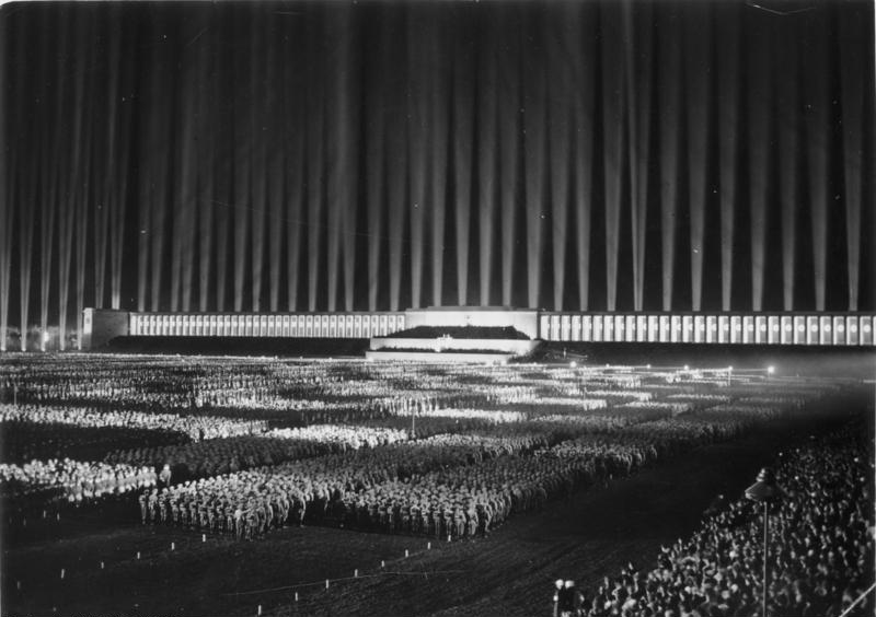 Nürnberg, Reichsparteitag, Lichtdom ADN-ZB/Archiv Reichsparteitag der NSdAP, "Parteitag der Ehre", eröffnet am 8.9.1936 in Nürnberg. 13166-36 [Nürnberg.- Reichsparteitag der NSDAP, "Reichsparteitag der Ehre", "Lichtdom" mit Flak-Scheinwerfern über Zeppelinfeld und Zeppelinhaupttribüne]